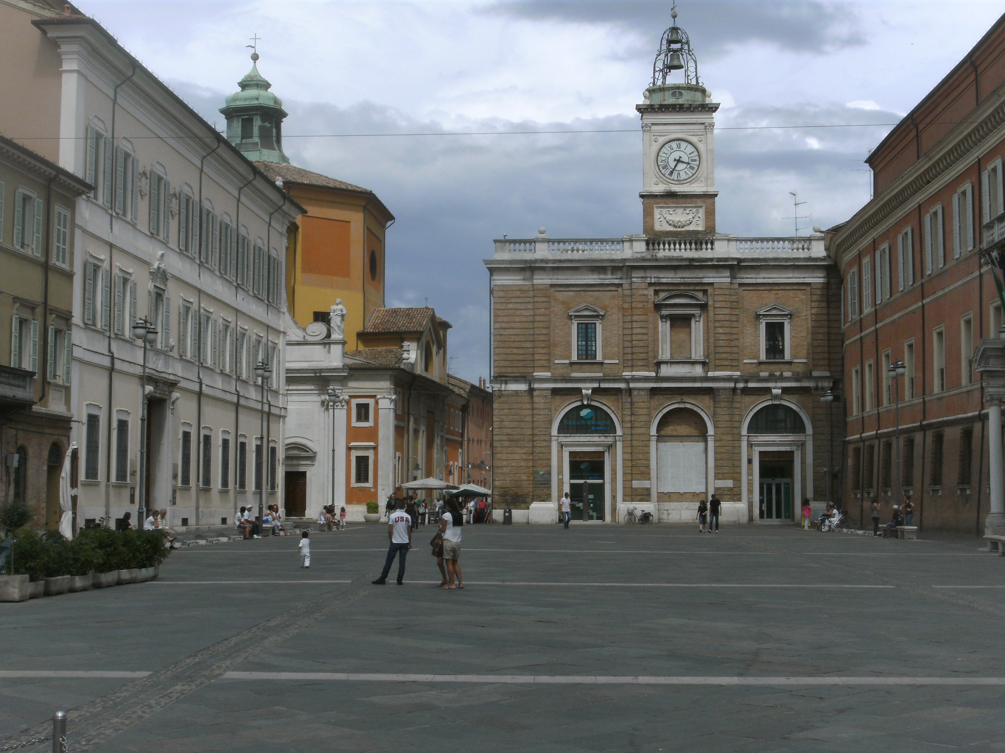 Ravenna, Piazza del Popolo, Ostseite (hinten links:Santa Maria del Suffragio)